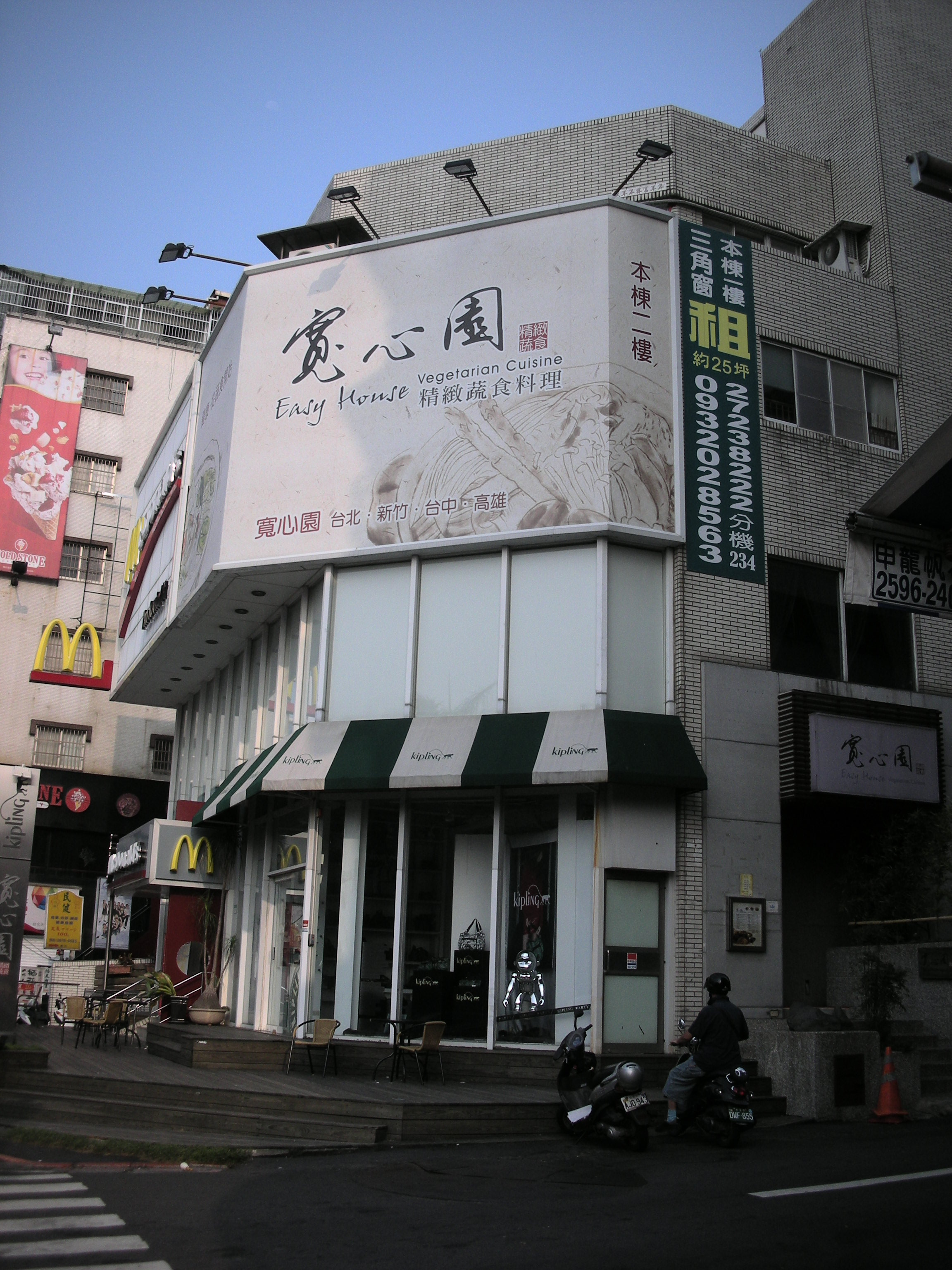 寬心園精緻蔬食料理臺北天母店，位於臺北市士林區天母西路9號2樓。